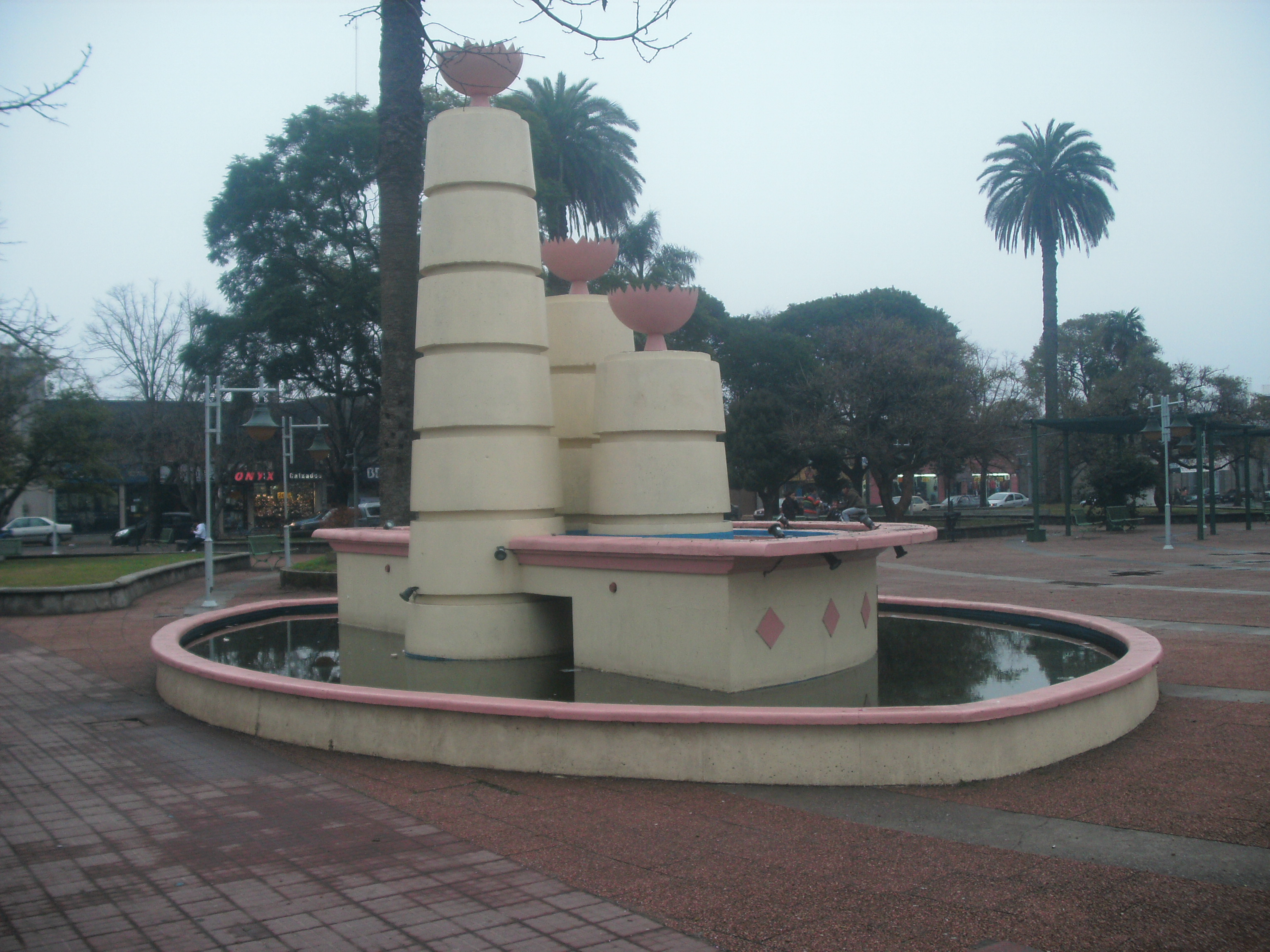 Monumento Plaza Carmelo